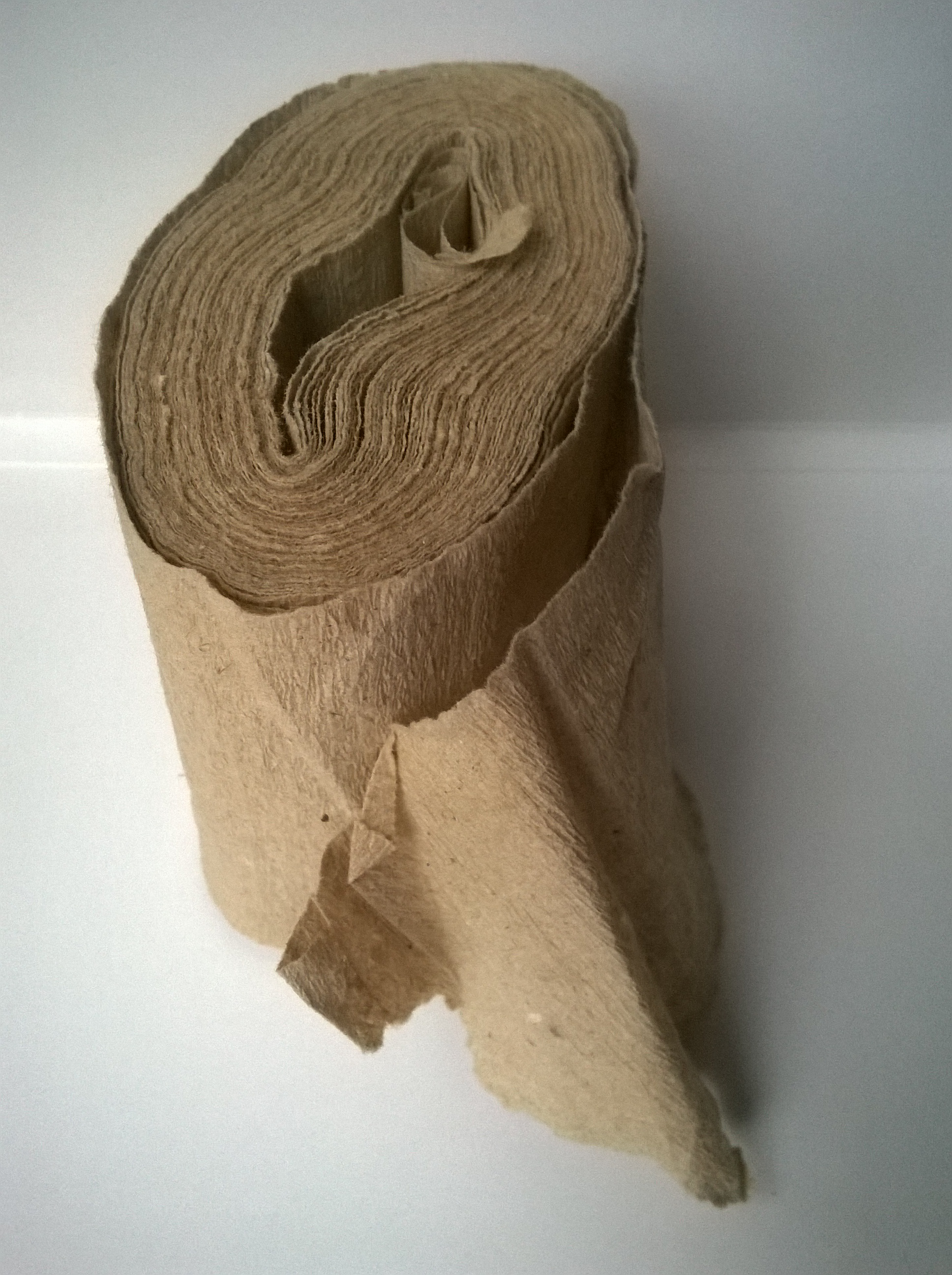 Klopapier - Krepp - DDR